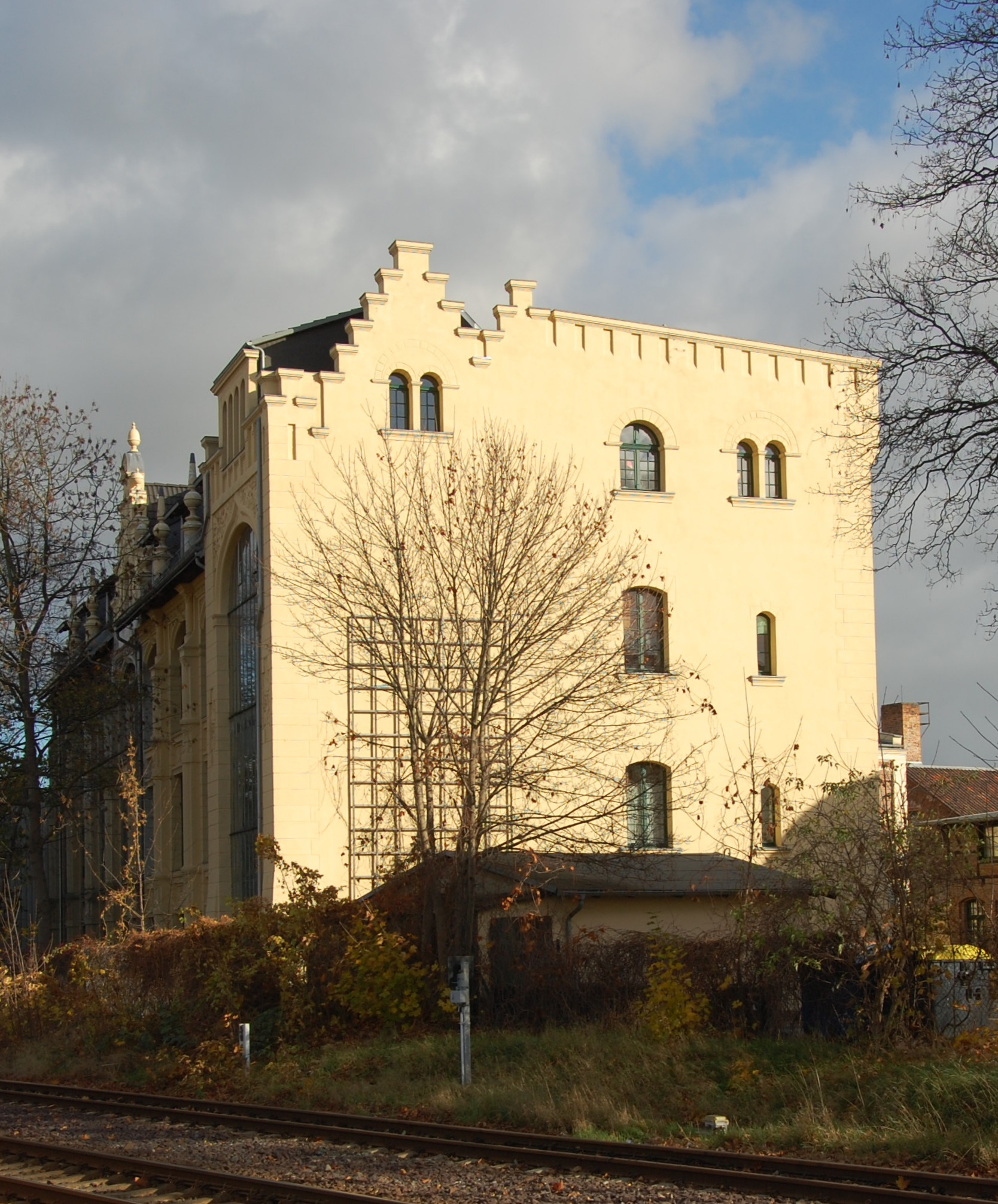 Haus Gernröder Weg 3 in Quedlinburg